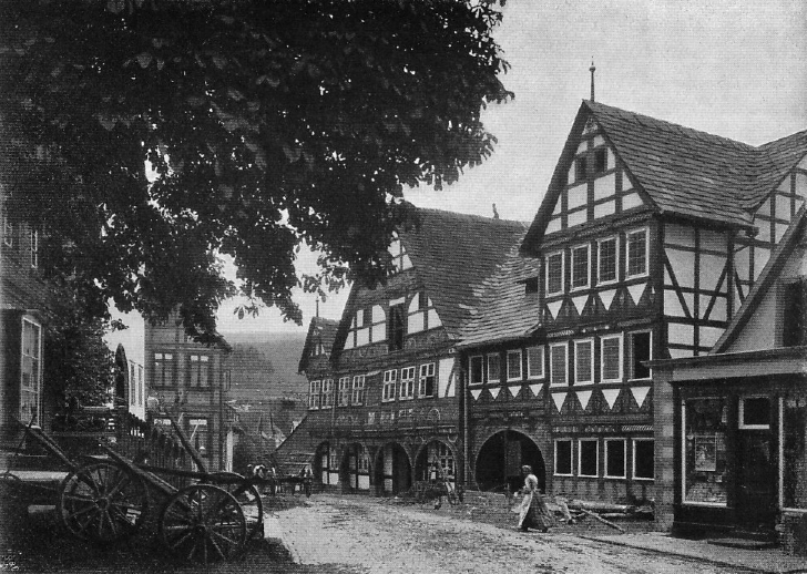 Originalbeschreibung „Das Rathaus in Schwalenberg“. – Schieder-Schwalenberg, Kreis Lippe, Nordrhein-Westfalen, Deutschland.